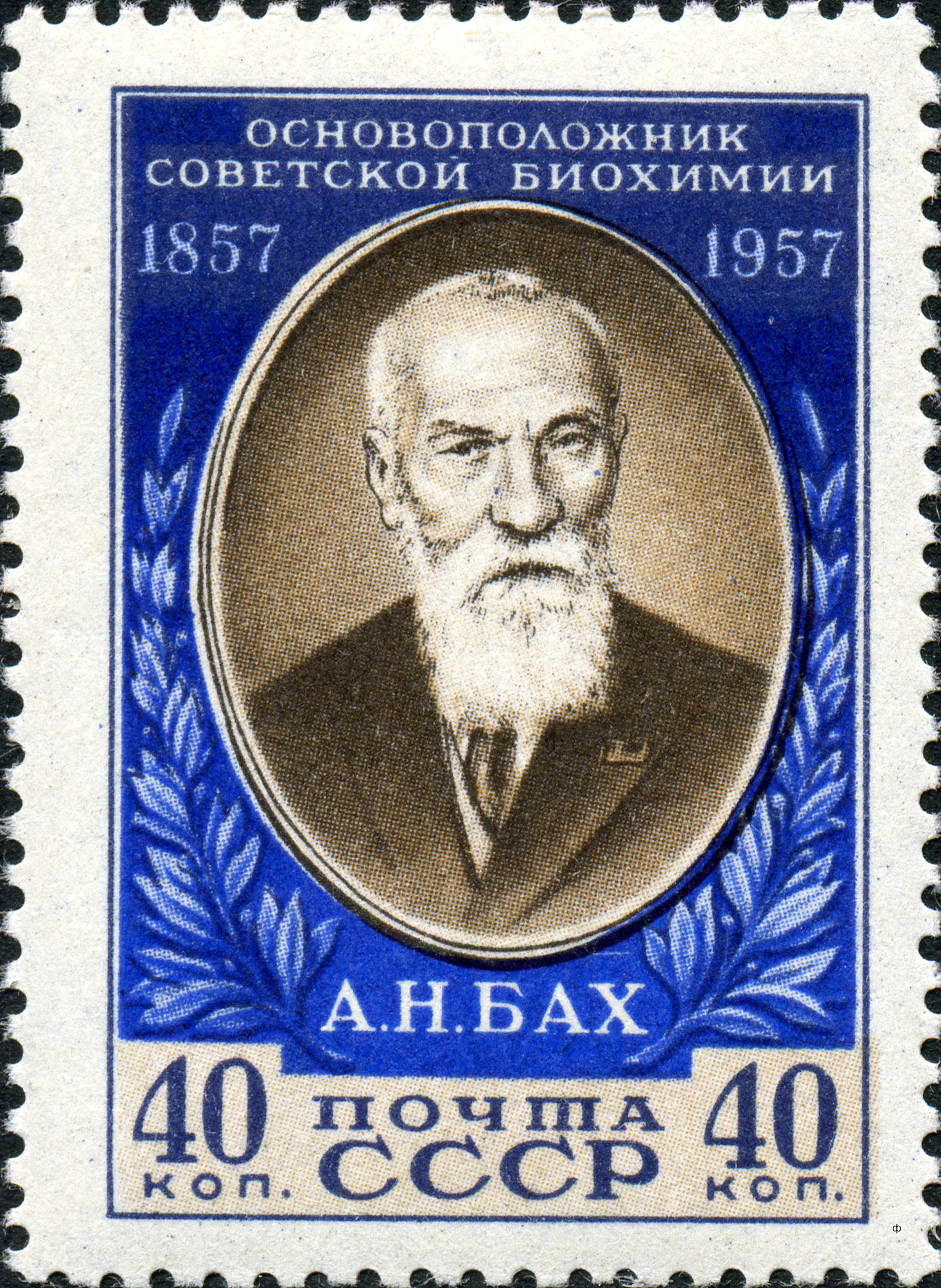 Марка СССР